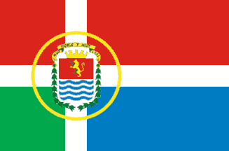 Bandera del municipio Barinas, estado Barinas, Venezuela